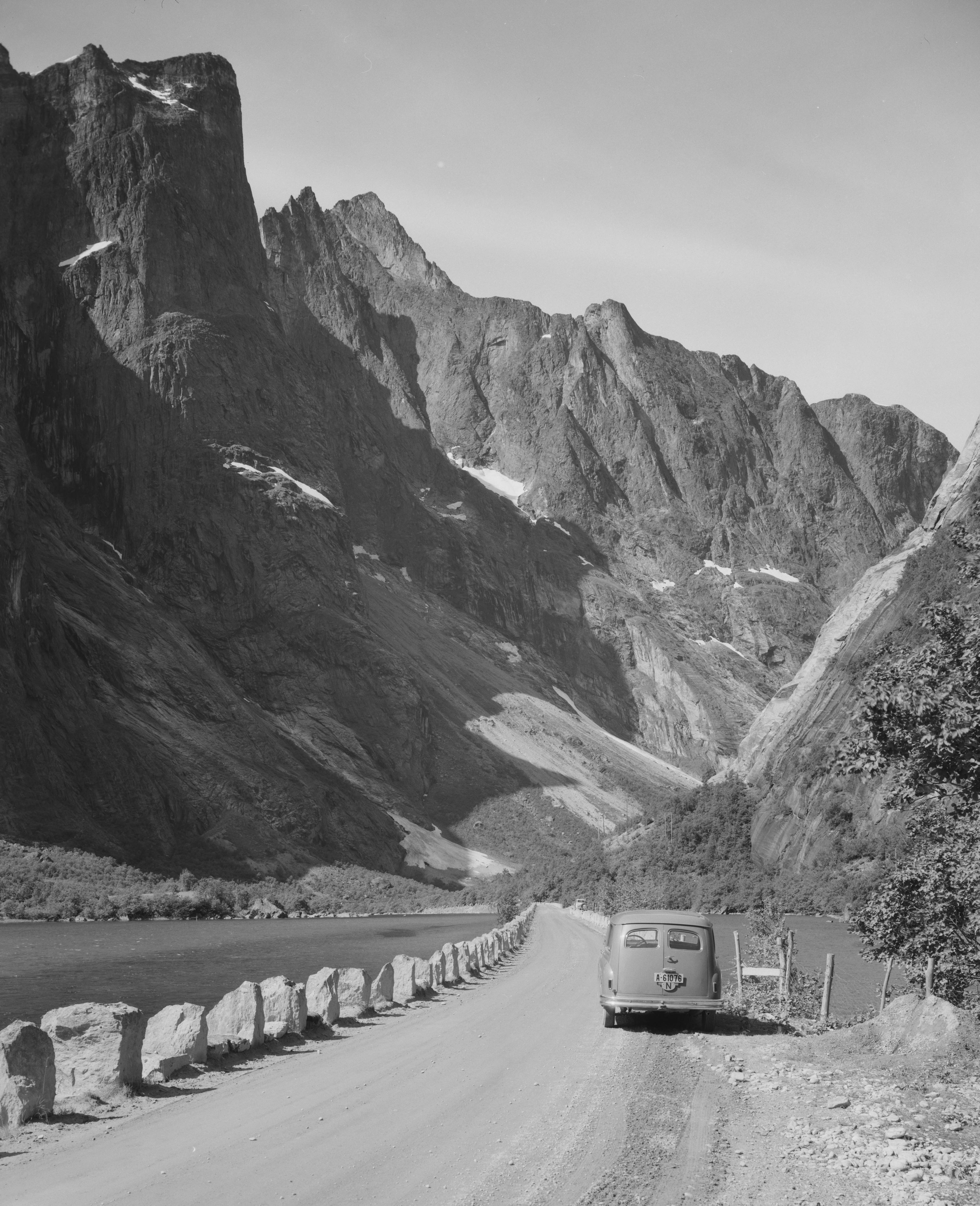 Bildet er hentet fra Nasjonalbibliotekets bildesamling Romsdalen,Trolltindan, Rauma, Møre og Romsdal